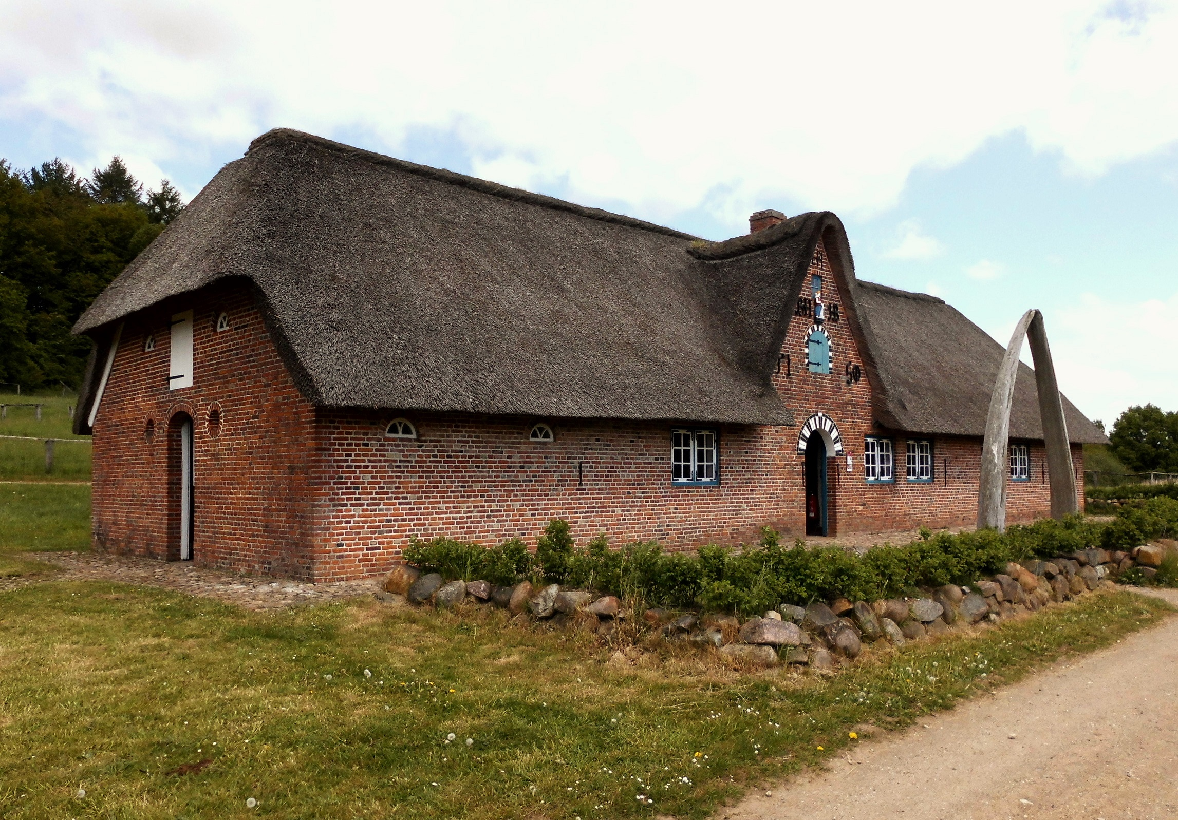 Haus aus Westerland („Lorens-Petersen-de-Hahn-Haus“). Erbaut 1699, Rekonstruktion und Wiederaufbau 1969.